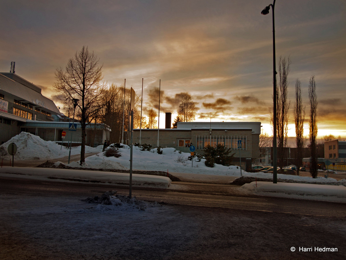 Kirjasto